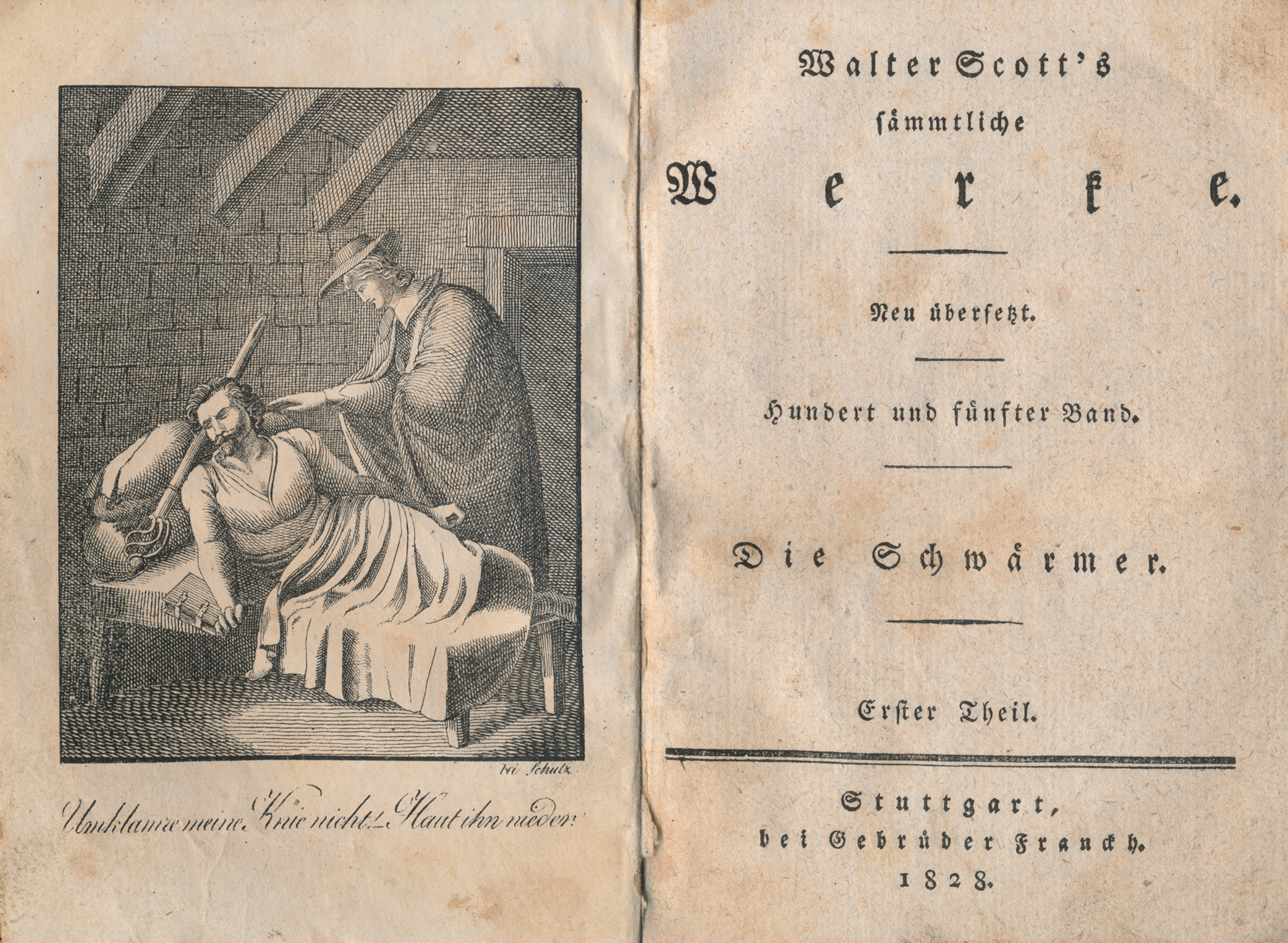 Walter Scott's sämmtliche Werke. Neu übersetzt. Hundert und fünfter Band. Die Schwärmer. Erster Theil. Stuttgart, bei Gebrüder Franckh, 1828. Aus der Sammlung Peter Schmelzle, Bad Wimpfen.